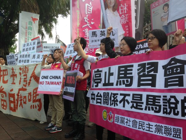 綠黨社會民主黨聯盟與自由台灣黨群眾，在立法院外抗議馬英九與馬習會。社會民主黨主席范雲、李晏榕、呂欣潔均在其中。